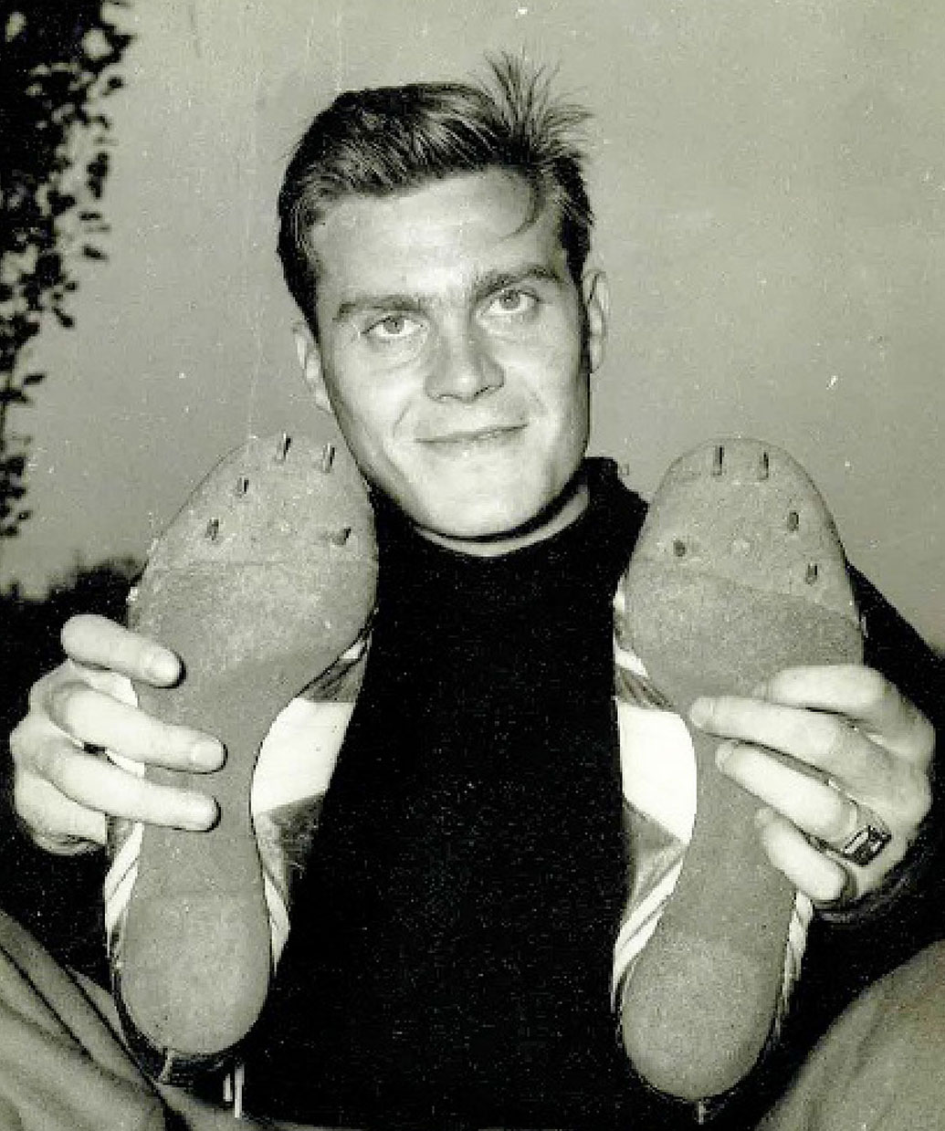 Photographie d'un journaliste travaillant à "Miroir des sport" publié en 1951